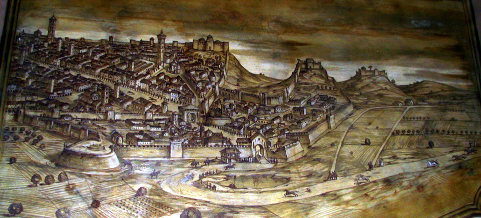 Asti, Palazzo del Comune, Affresco della corsa del Palio alla Lunga . Foto fatta da me Faberh 2006